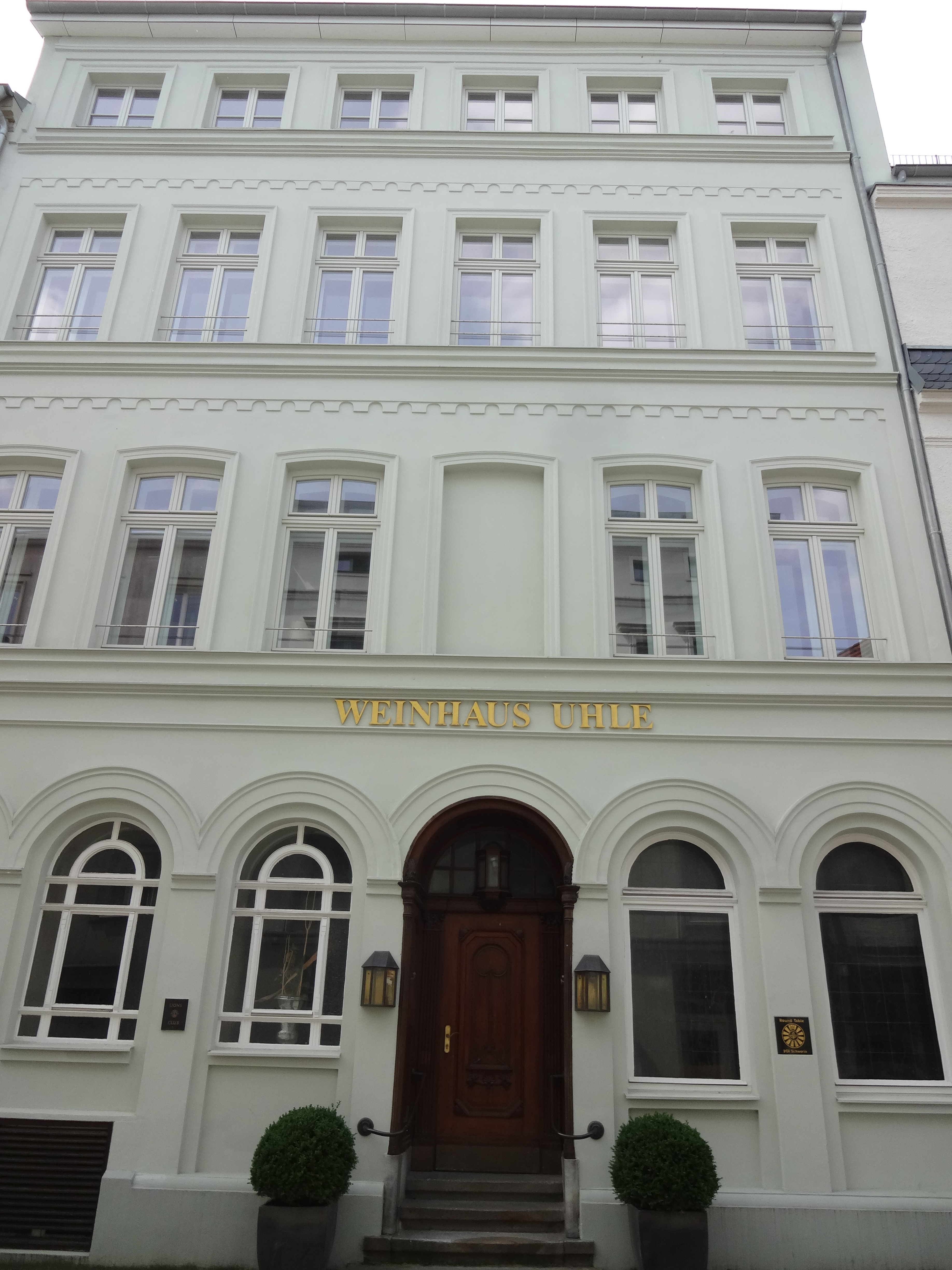 Denkmalgeschützte Gaststätte (Weinhaus Uhle) in der Schusterstraße 15 in Schwerin Denkmageschütztes Haus in der Schusterstraße in Schwerin